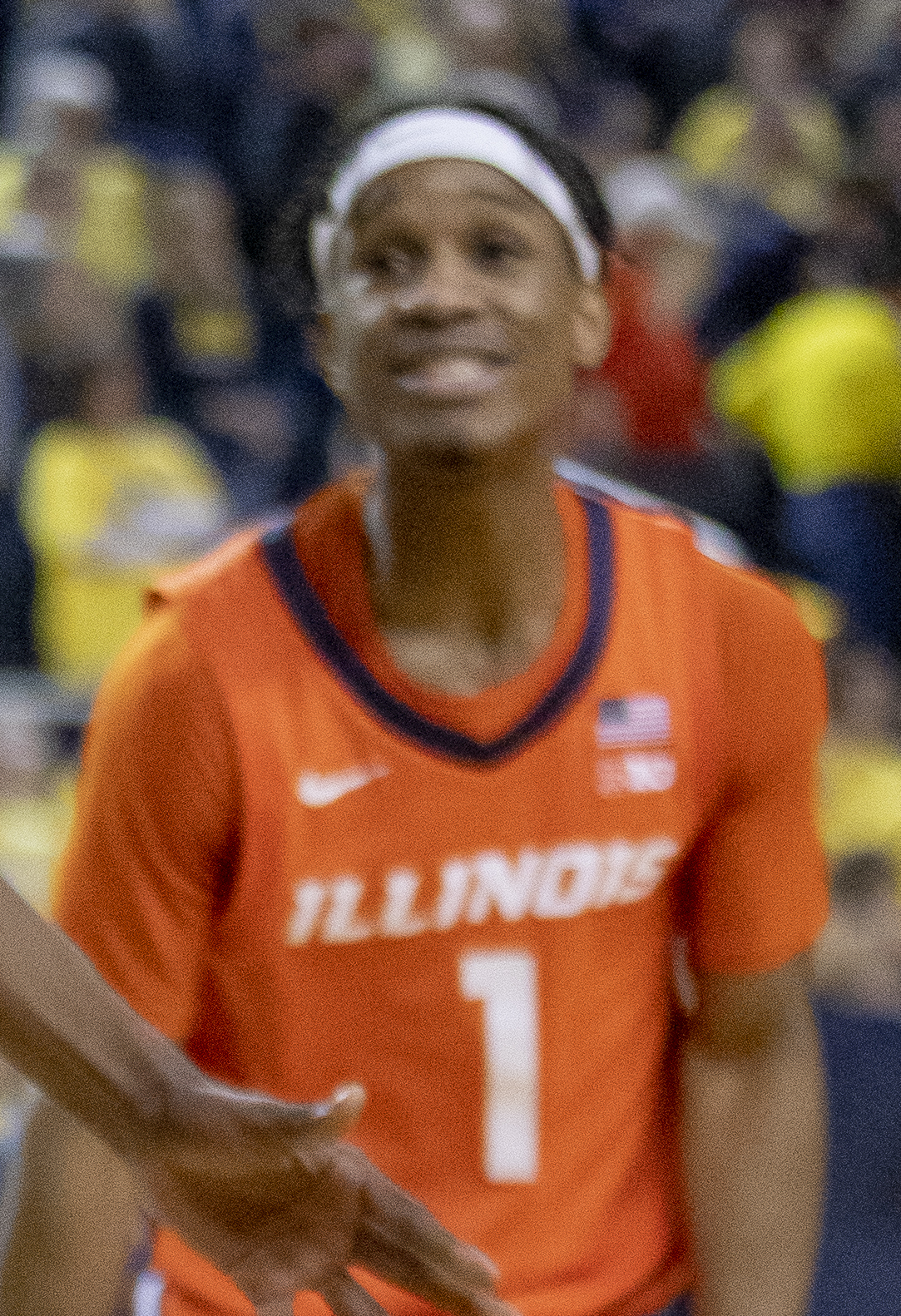 _O6A1775